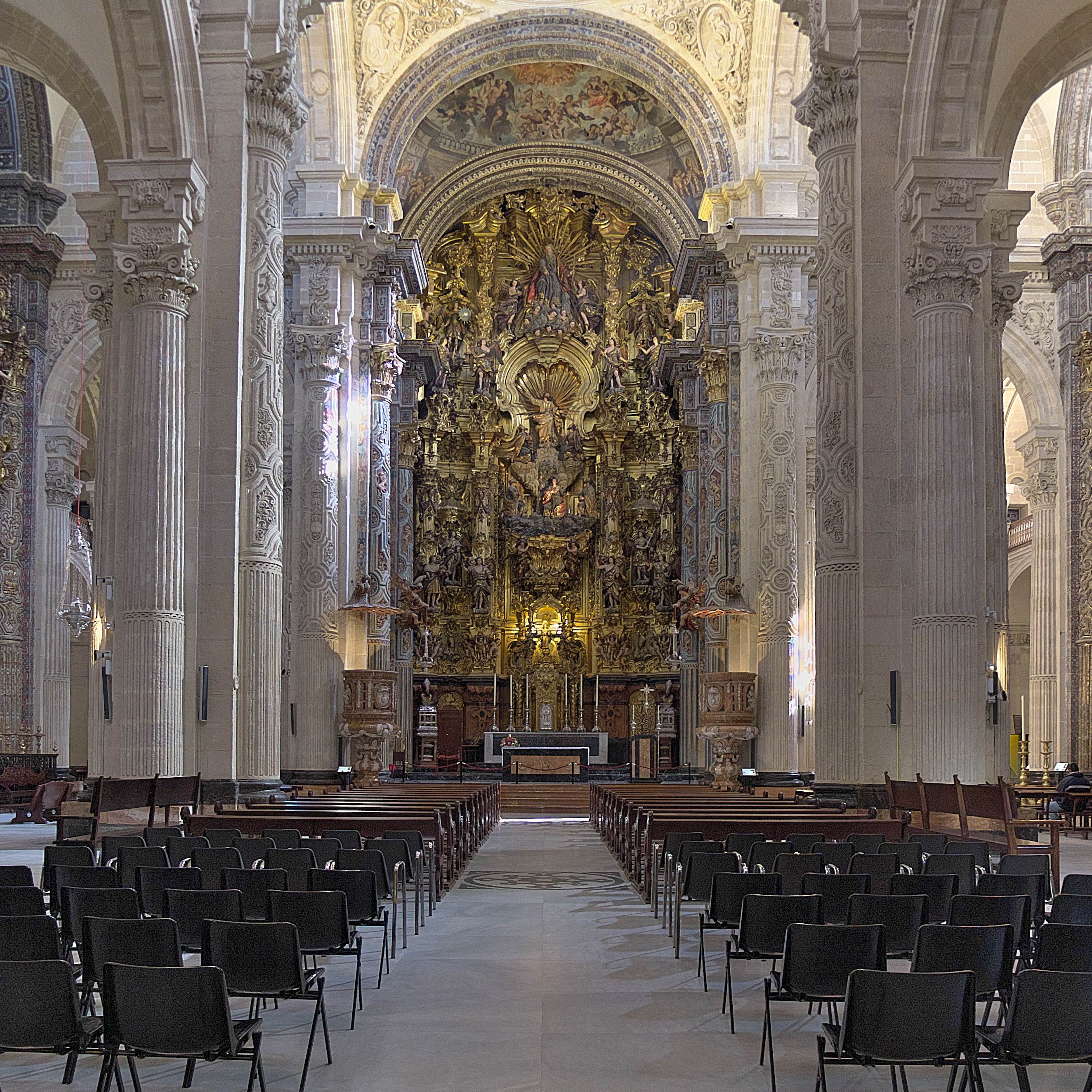 Esteban García y Pedro Romero iniciarían los primeros proyectos de reconstrucción del templo (1671-1679). Leonardo de Figueroa lo terminaría con las etapas de construcción de la cúpula, cerramientos de las bóvedas y decoración interior (1696-1712). El retablo mayor es la obra cumbre de Cayetano de Acosta (1770-1779).